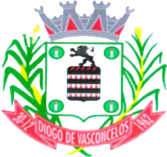 Brasão da Cidade de Diogo De Vasconcelos